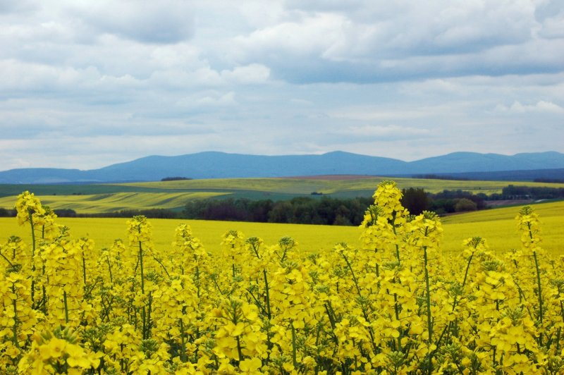 Malé Karpaty, view from Letničie